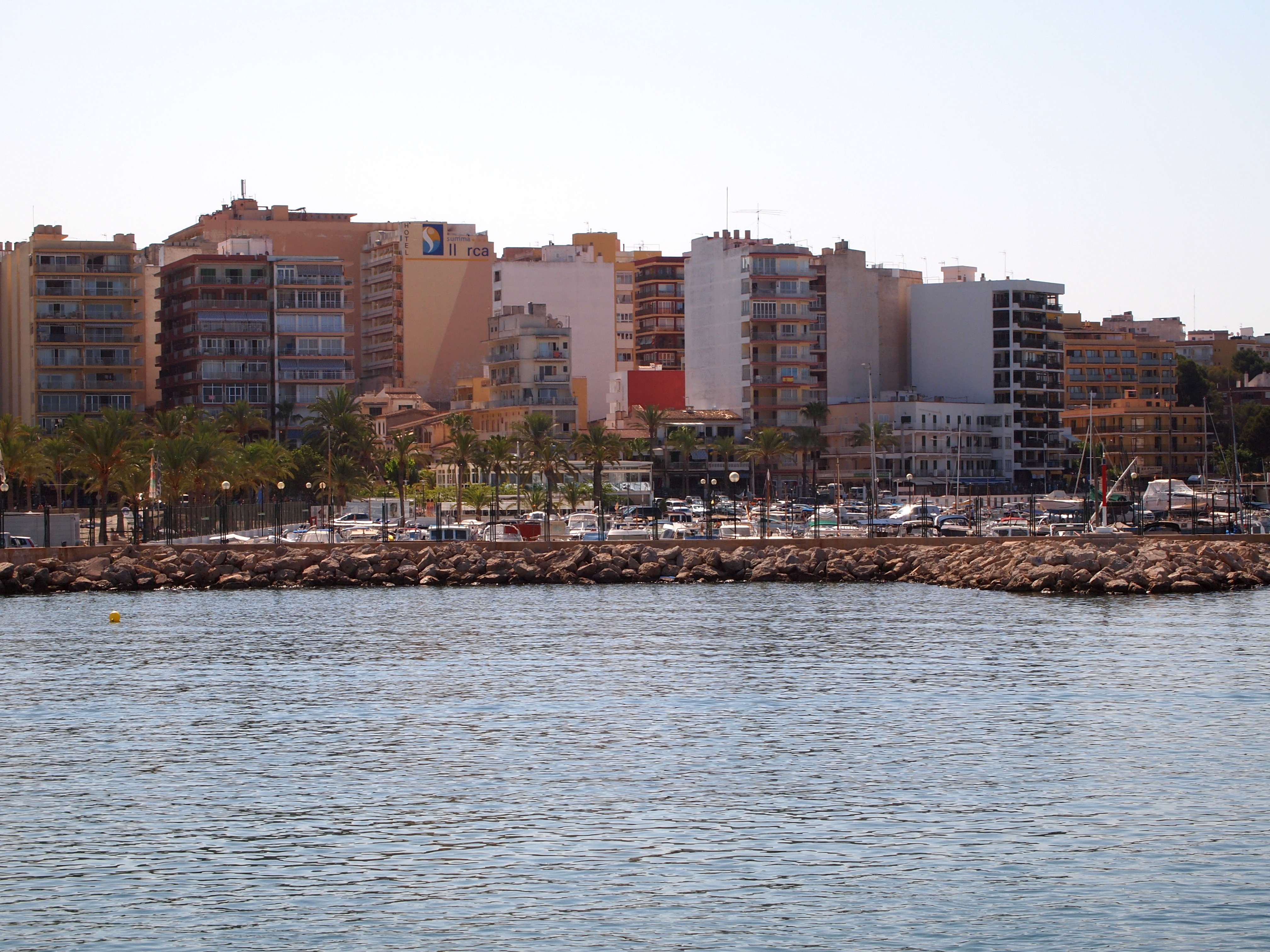 Façana marítima de s'Arenal de Llucmajor des de la bocana del port del Club Nàutic arenal (CNA)